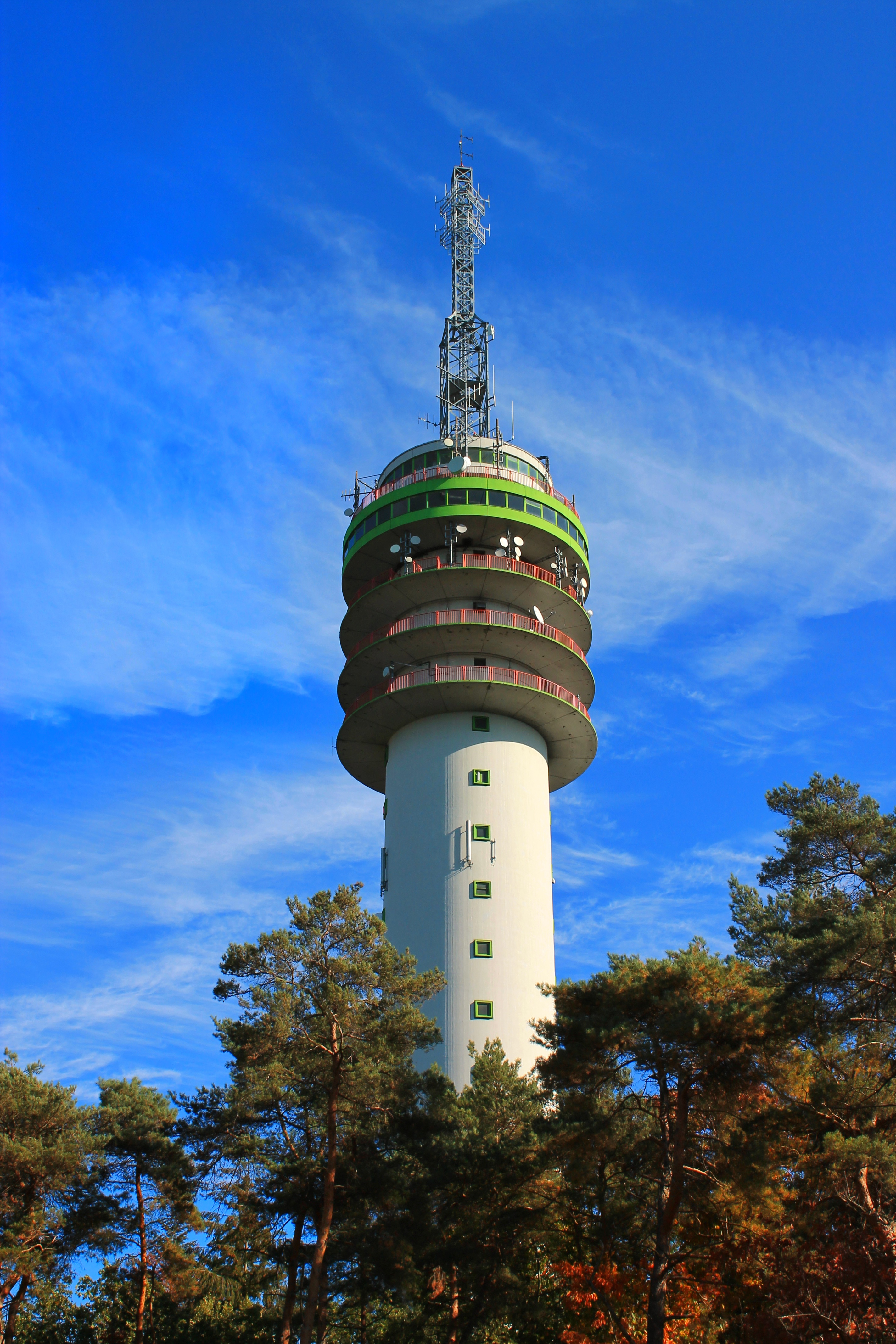 Televisie toren Mierlo vanaf het Mierlose bos